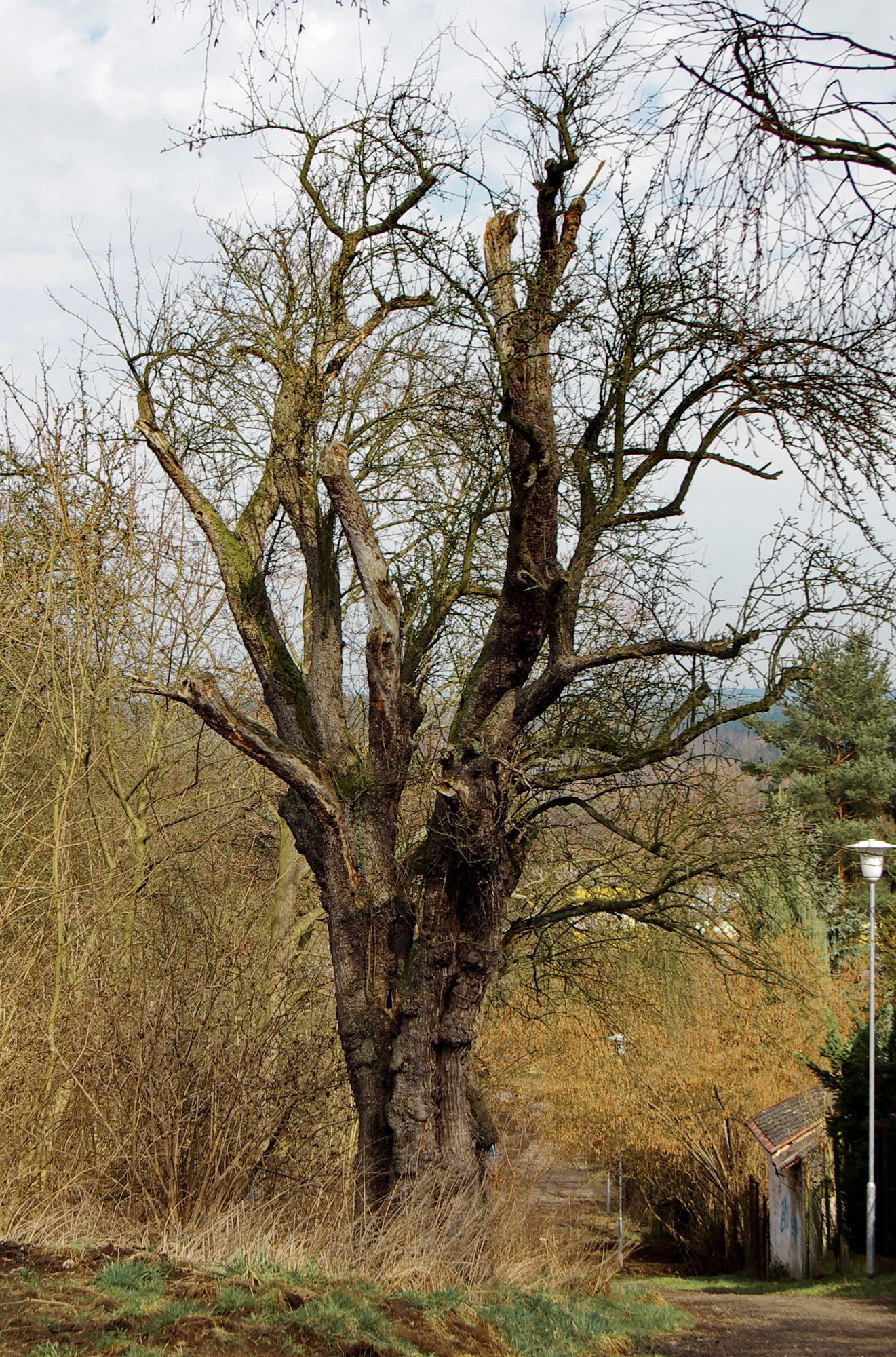 Památný strom - Hrušeň v Drahovicích - Karlovy Vary, místní část Drahovice